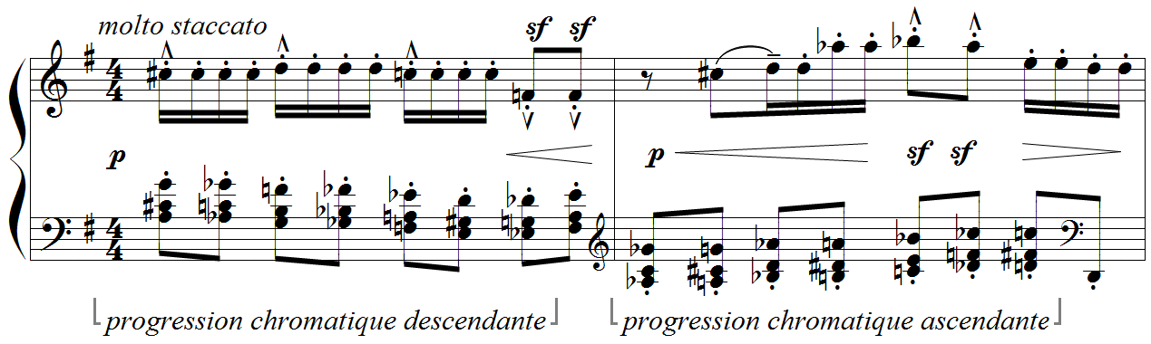 Debussy - Etude "pour les notes répétées", mes. 70-71